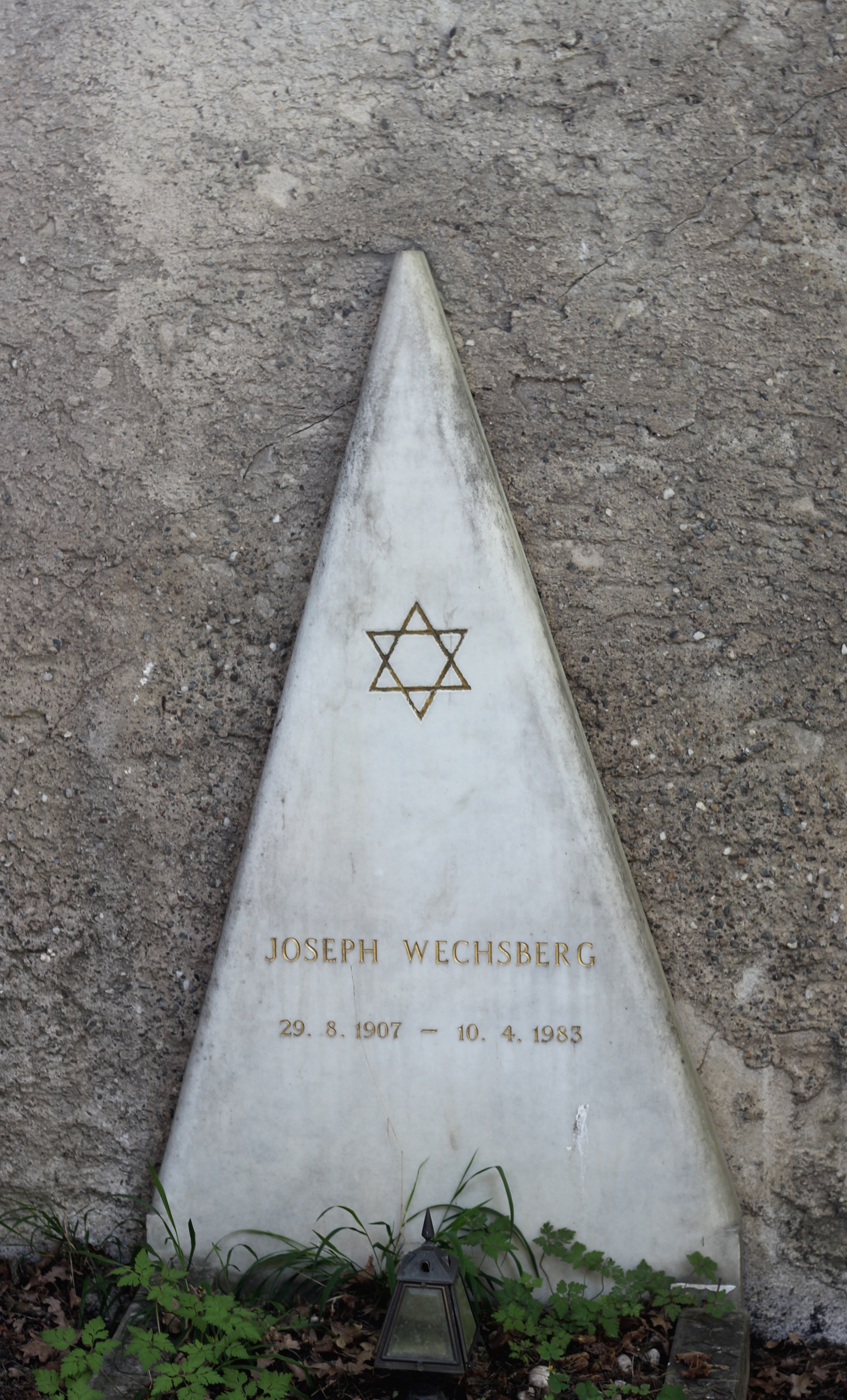 Meran Jüdischer Friedhof Grab Joseph Wechsberg